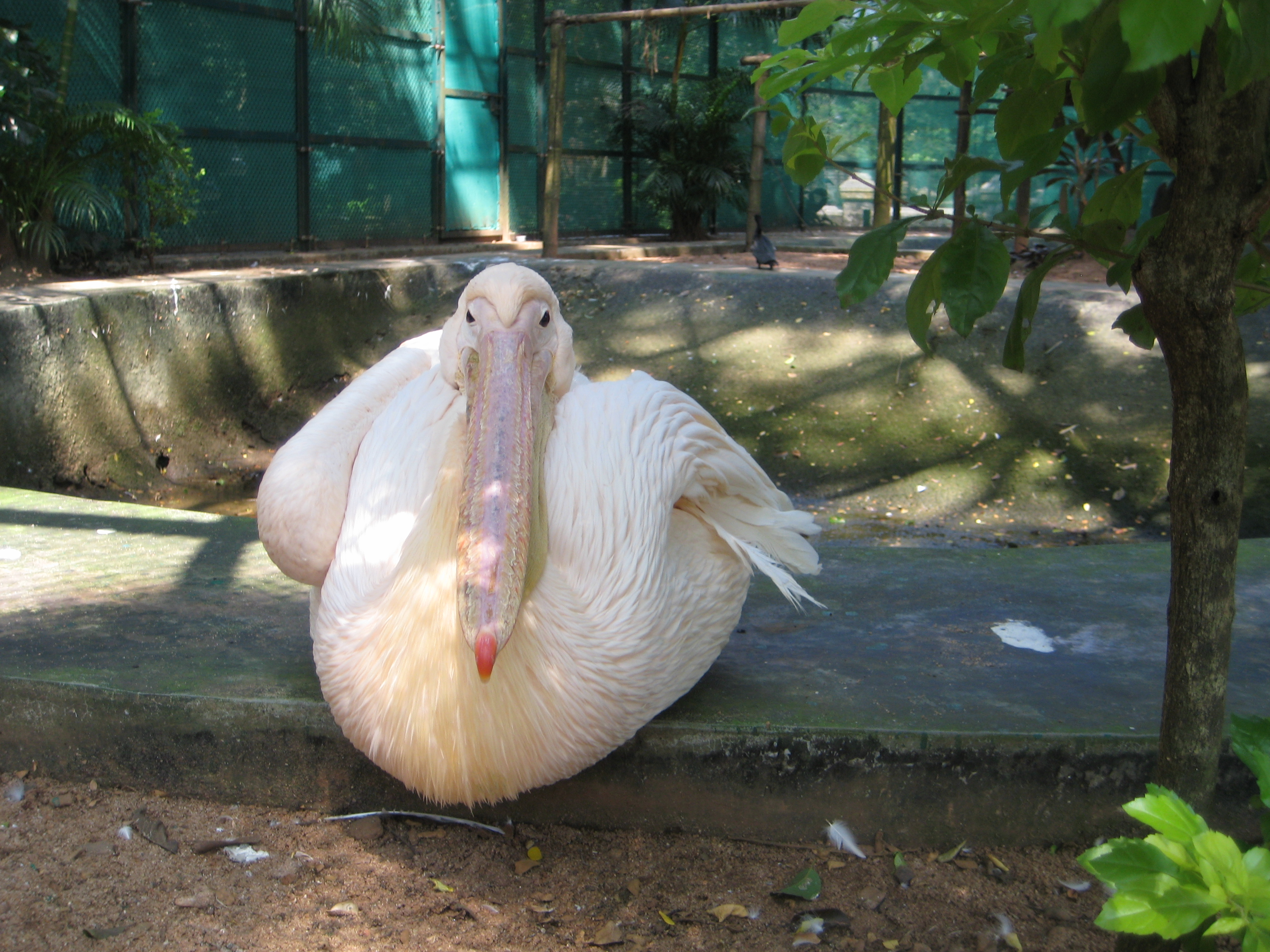 Pelican, പെലിക്കൻ, White Pelican Pelecanus Onocrotalus